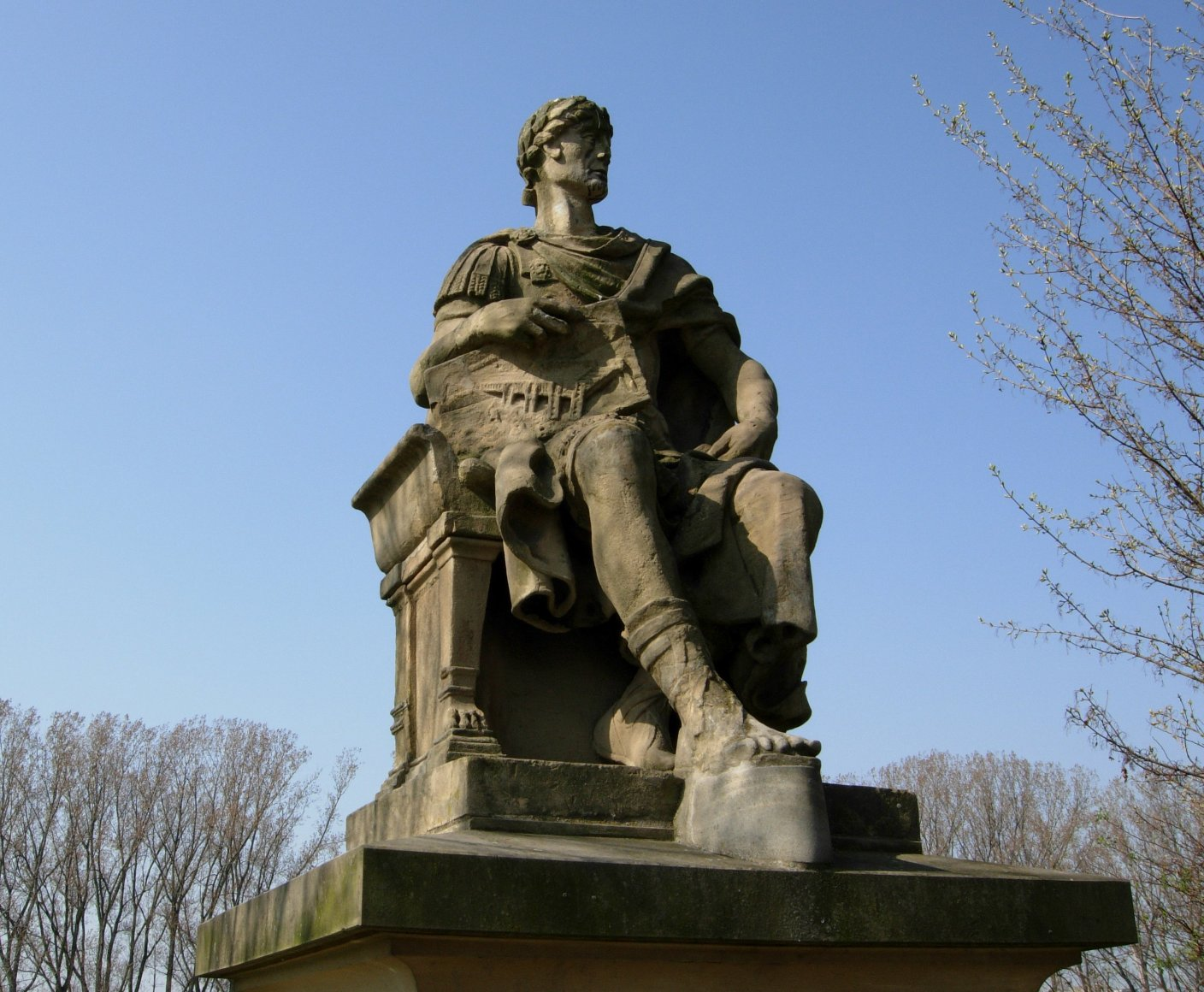 Caesar-Denkmal in Bonn-Schwarzrheindorf